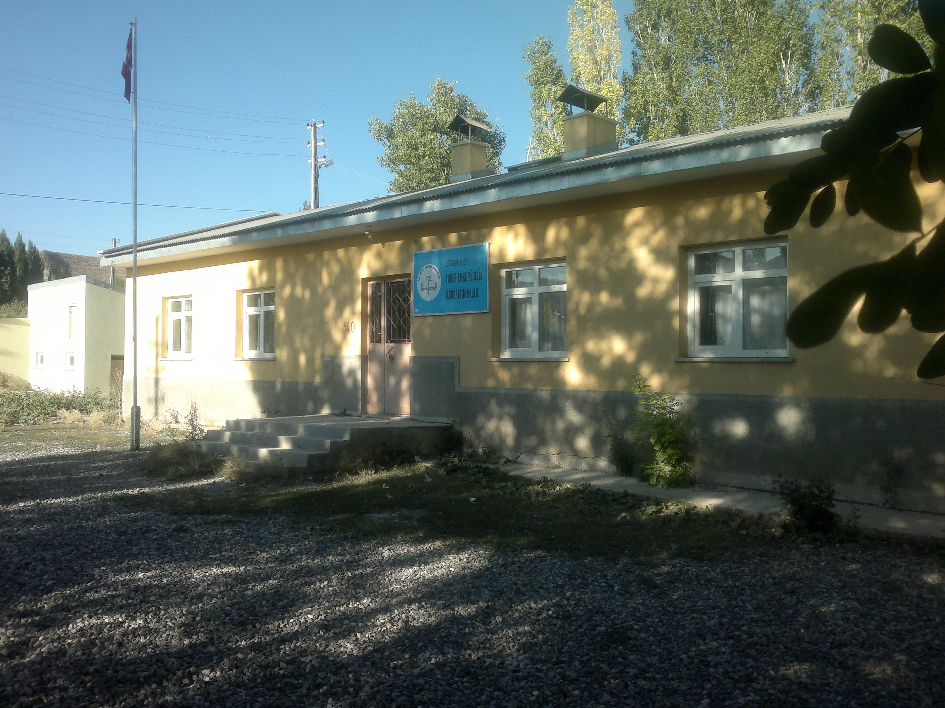 Türkiye'de Erzurum ili merkez Aziziye (eski adı:Ilıca) ilçesine bağlı Alaca köyü ilkokulu